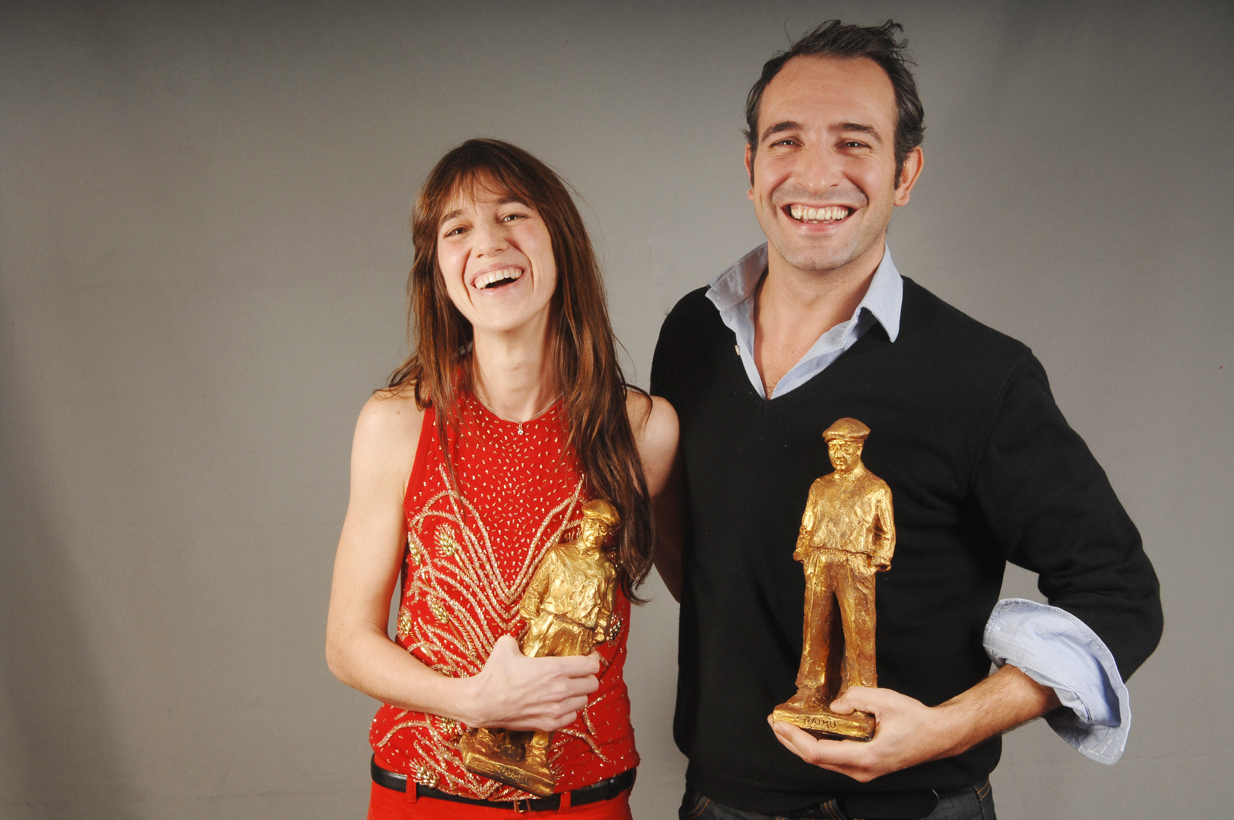 Charlotte Gainsbourg et Jean Dujardin lors de la 2ème cérémonie des Raimu de la Comédie.